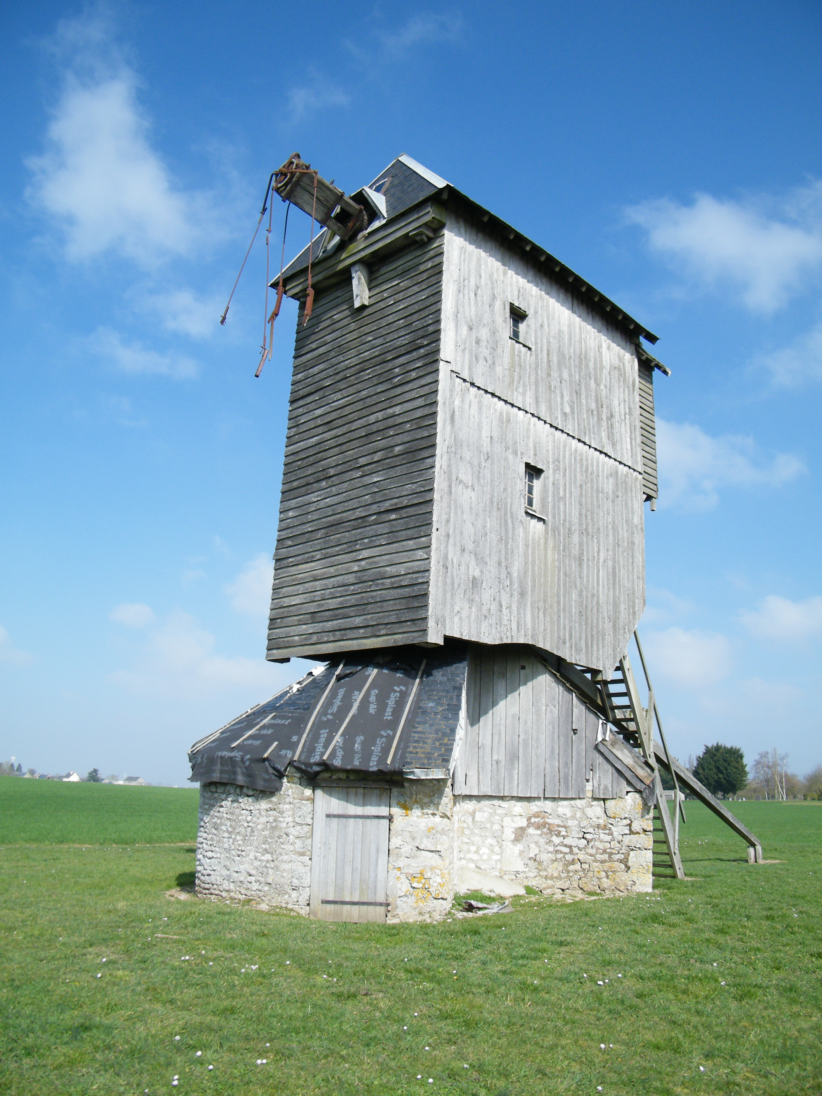 Moulin à vent de Lignerolles